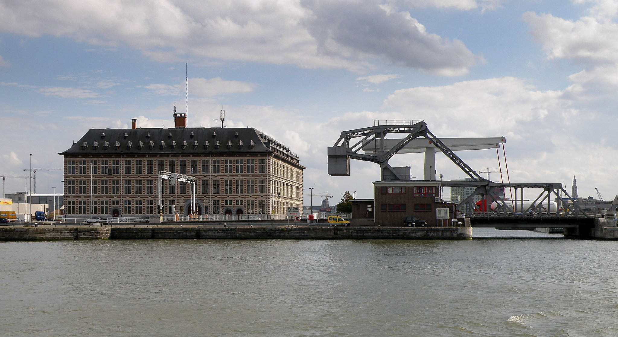 Antwerpen, België. Links: brandweerkazerne aan de Siberiastraat, in het oudere gedeelte van de Antwerpse haven. Bouwjaar 1922, n.o.v. stadsbouwmeester Emiel Van Averbeke, geïnspireerd op het in 1893 afgebrande Hansahuis. Rechts: Siberiabrug. In de verte, tussen Siberiabrug en brandweerkazerne: (onafgewerkte, stompe) klokkentoren van de Sint-Jacobskerk; helemaal rechts: toren van de kathedraal. Op de voorgrond, water van het Siberiadok. Blikrichting zuid.